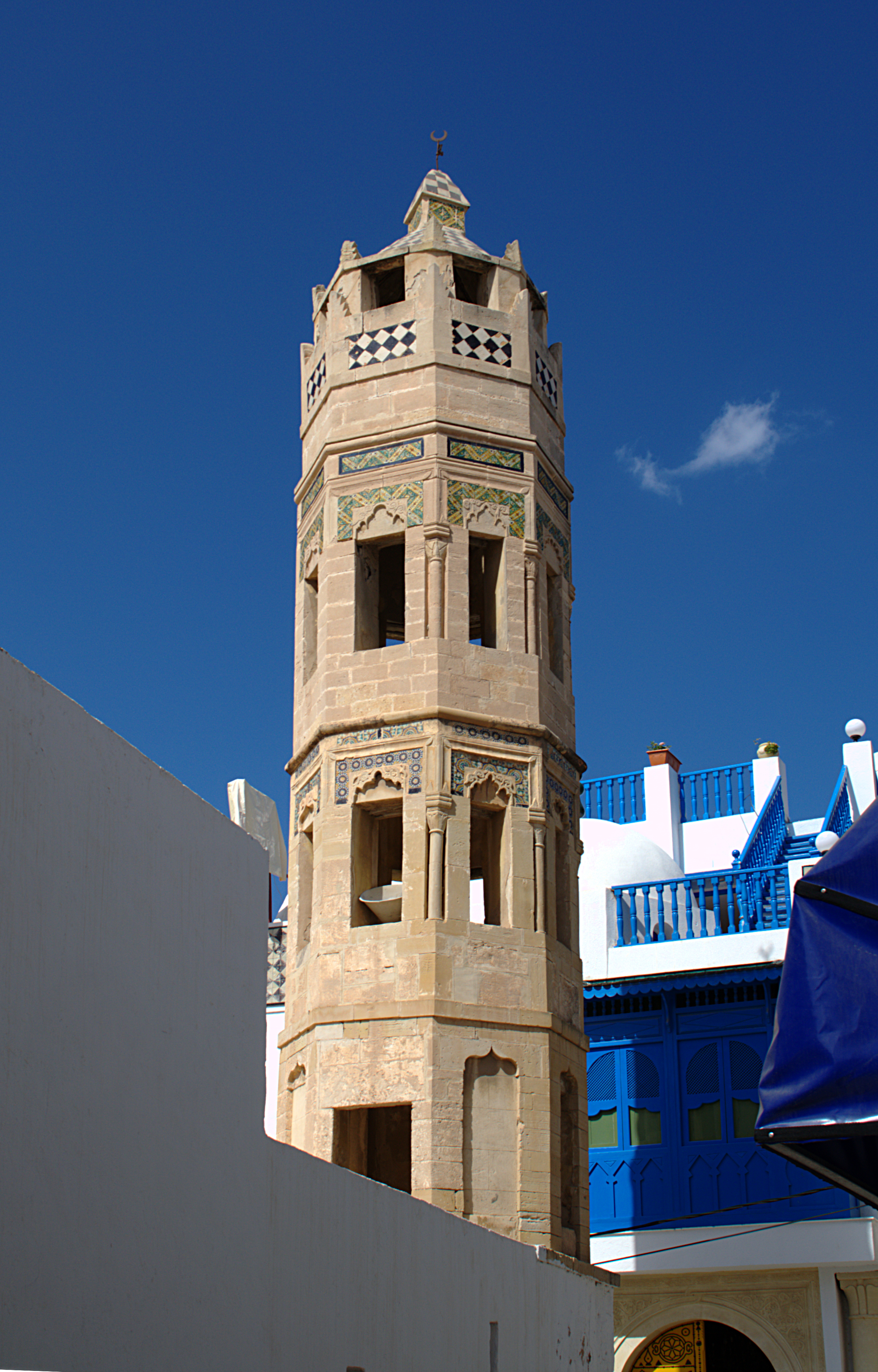 Zaouiat Al Zouqaq, Sousse